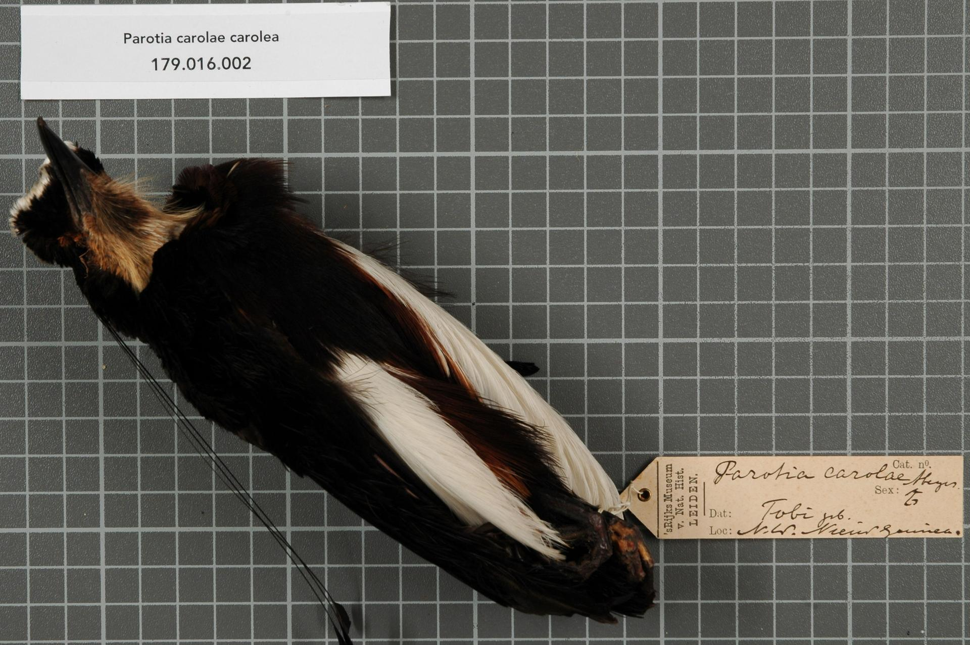 Parotia carolae carolae A.B. Meyer, 1894